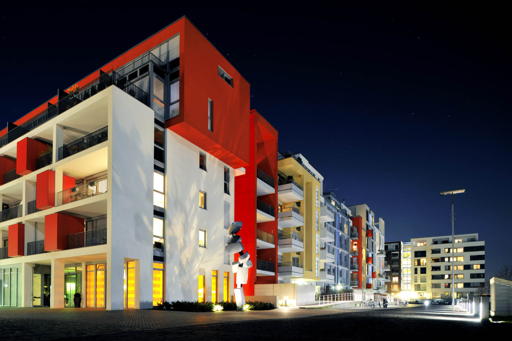 Quartis Les Halles, Düsseldorf, Nachtansicht